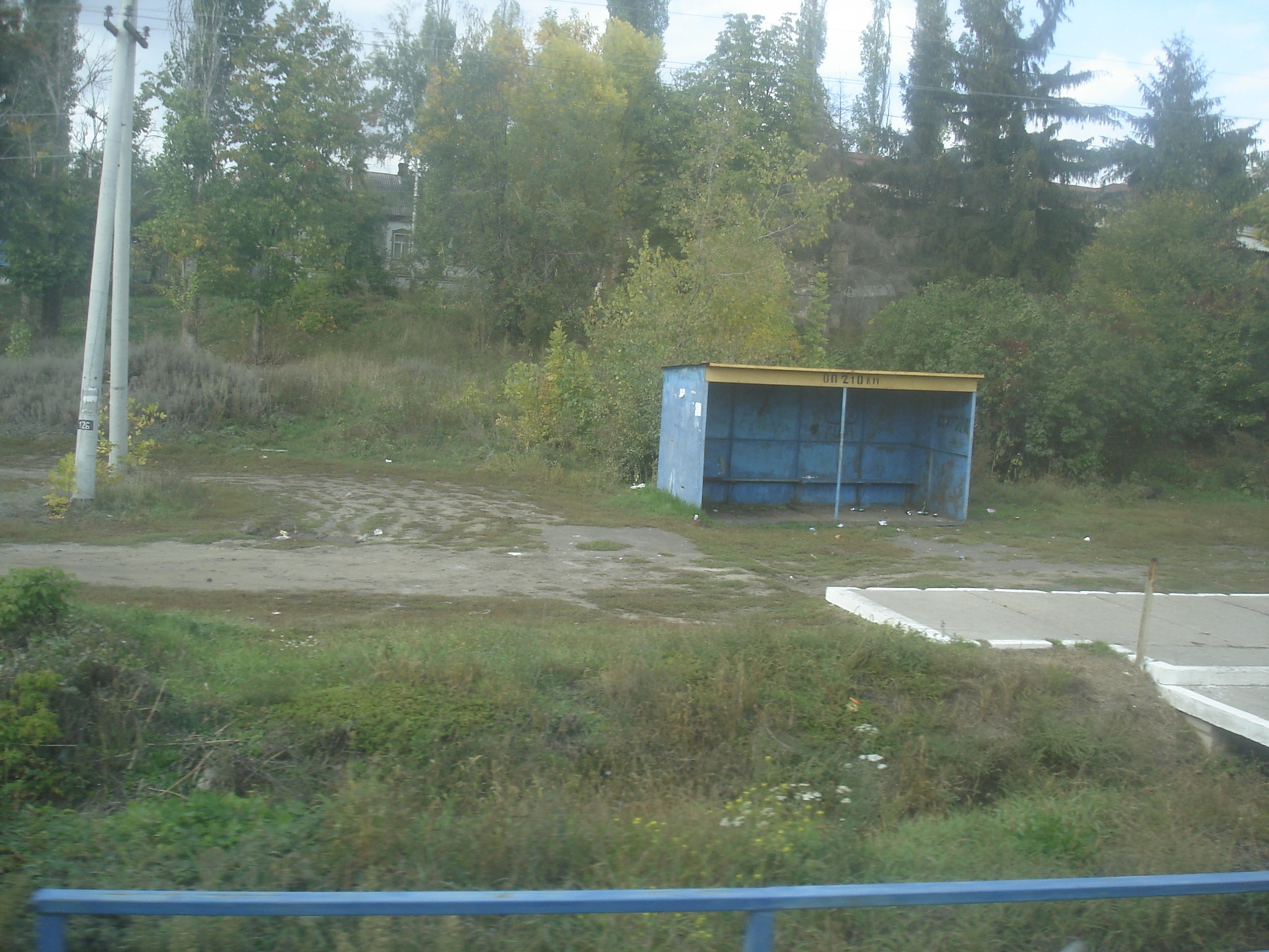 ОП 210 км ЮВЖД - павильон на ОП